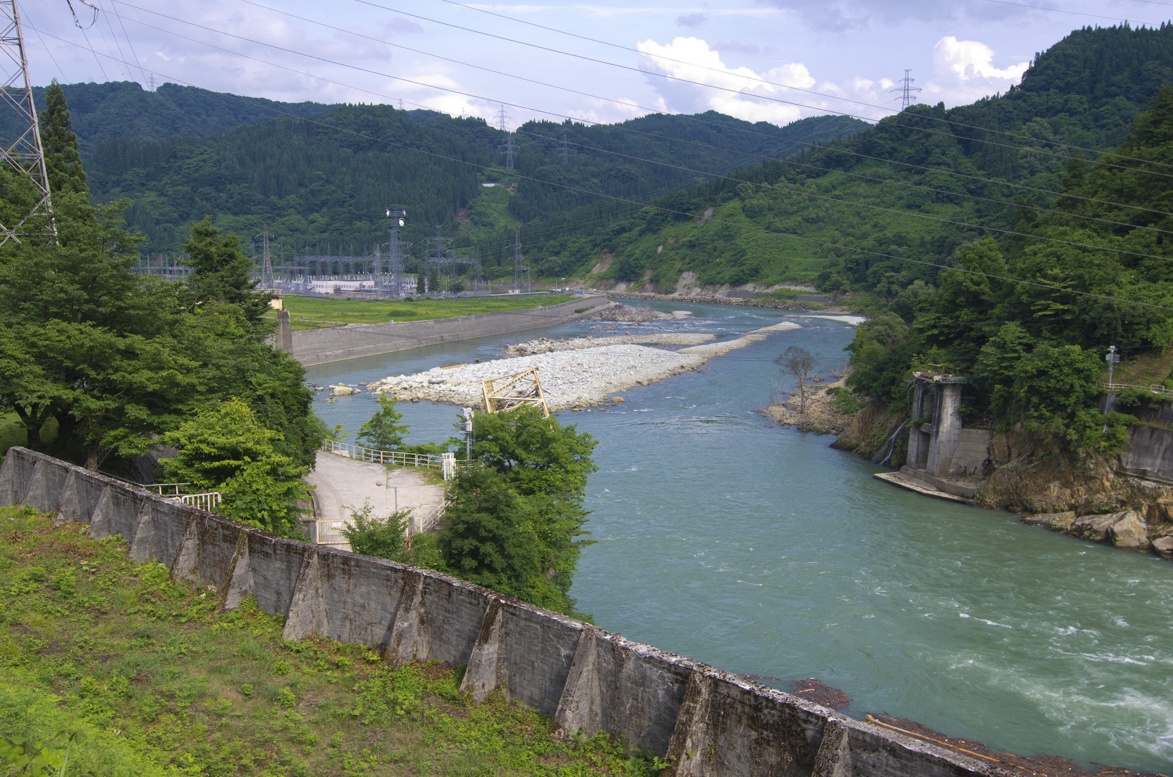 JR只見線第六只見川橋梁付近（平成23年新潟・福島豪雨により流出後）